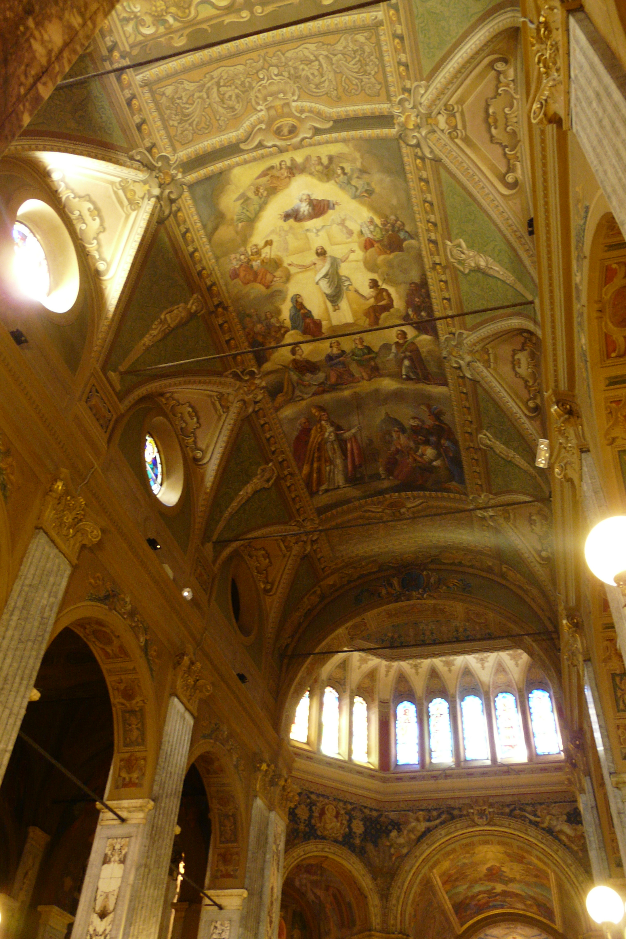 Basilica dei Santi Gervasio e Protasio, affreschi nel soffitto, Rapallo, Liguria, Italia